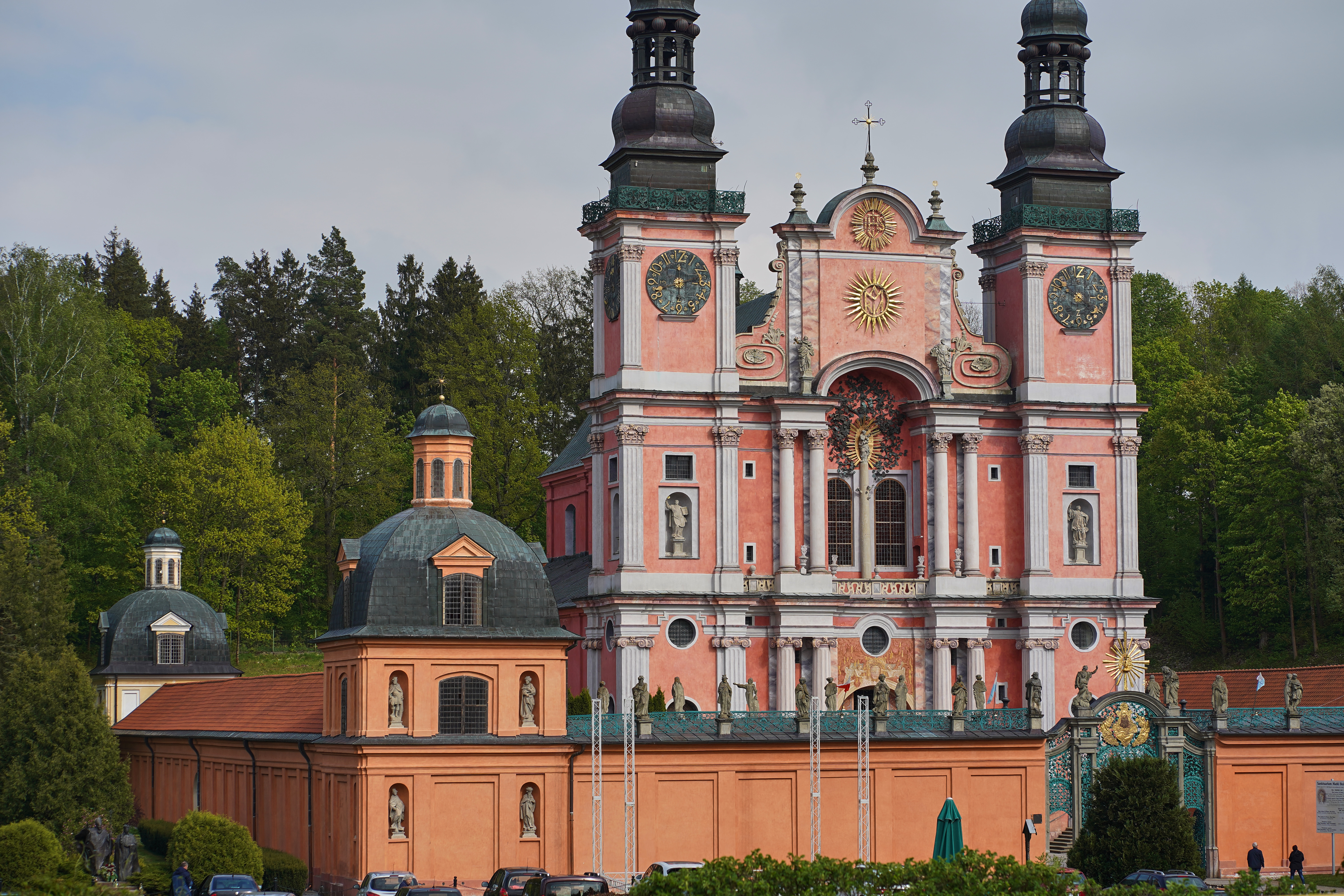 Święta Lipka, Kościół Nawiedzenia NMP (pielgrzymkowy)